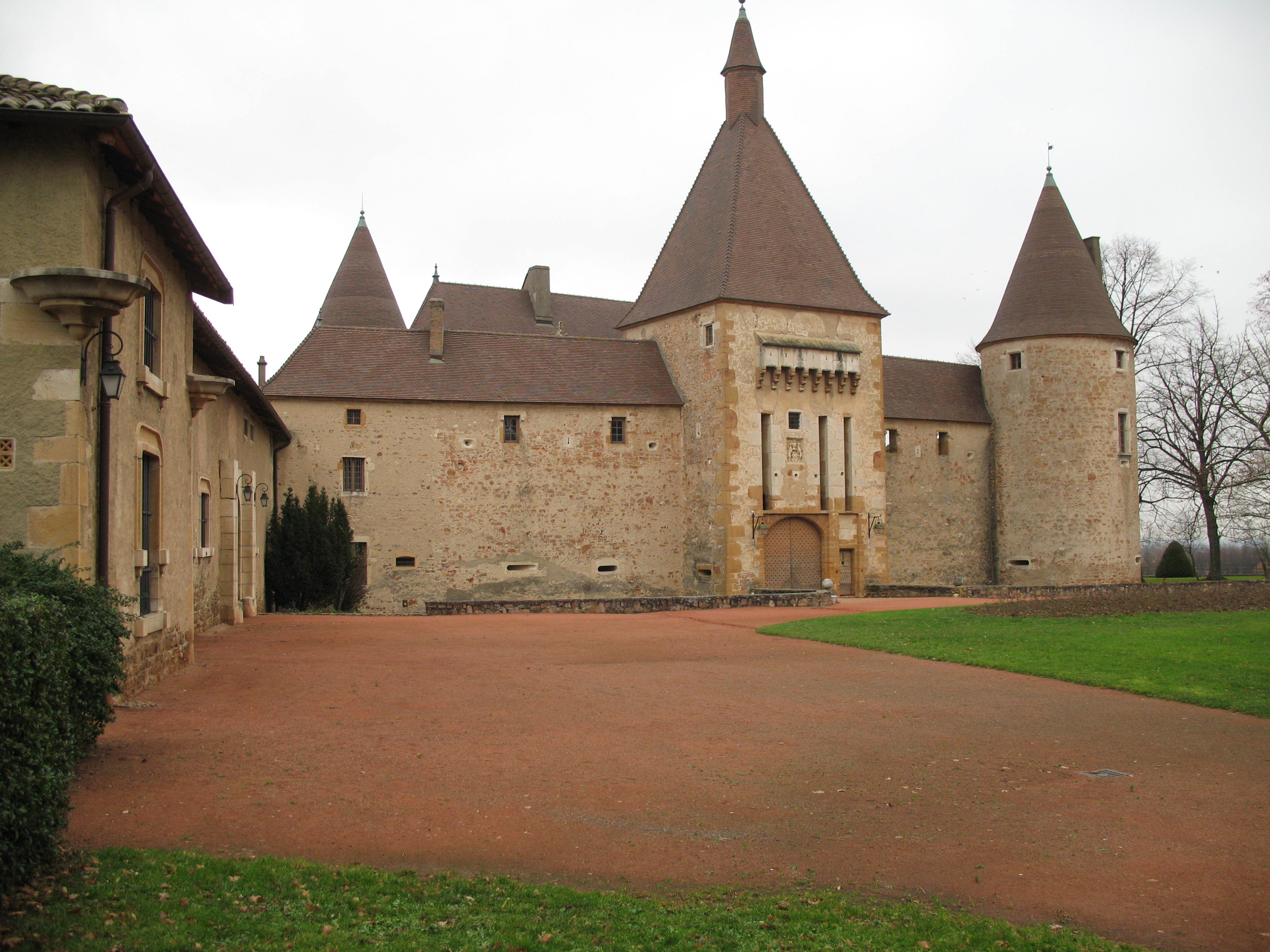 Château de Corcelles-en-Beaujolais dans le Rhône, côté sud